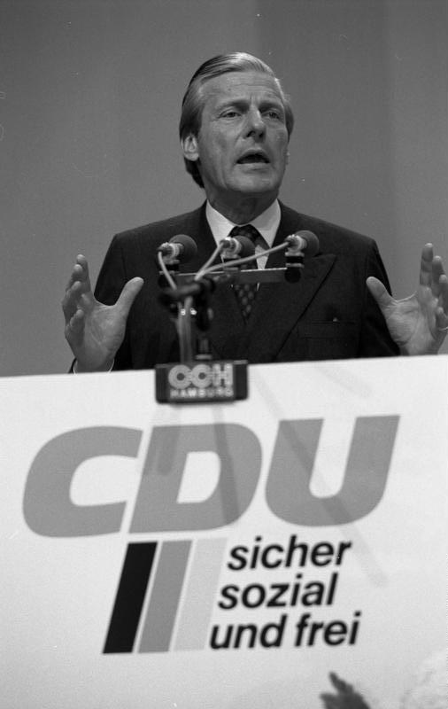 2.-5.11.1981 30. Bundesparteitag der CDU in Hamburg im Congreß Centrum